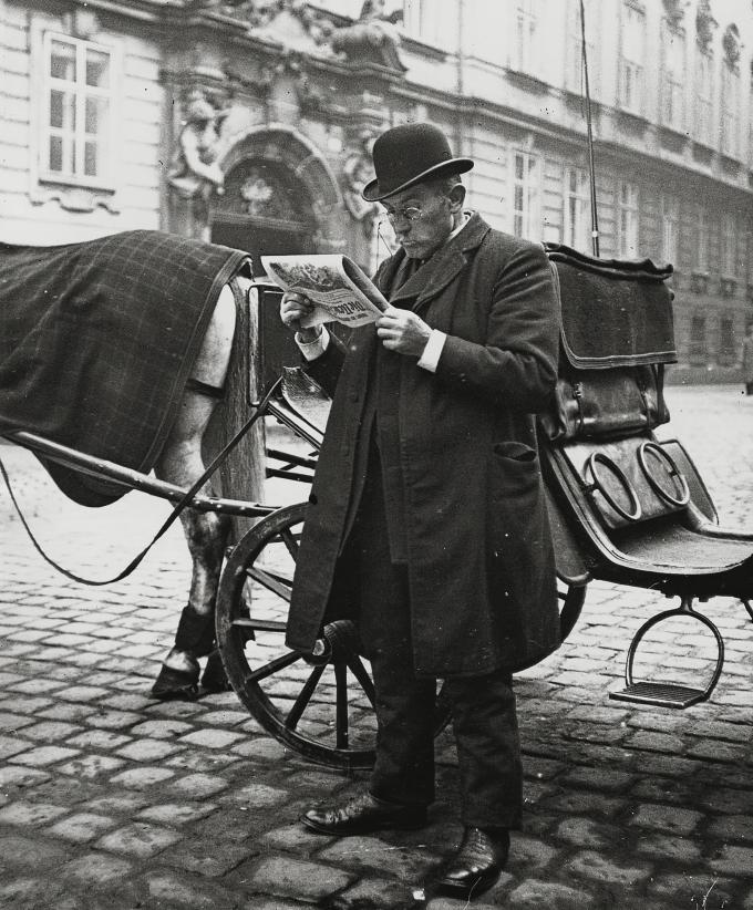 Kutscher in der Pause beim Zeitungslesen, vor der Böhmischen Kanzlei am Judenplatz; Wien